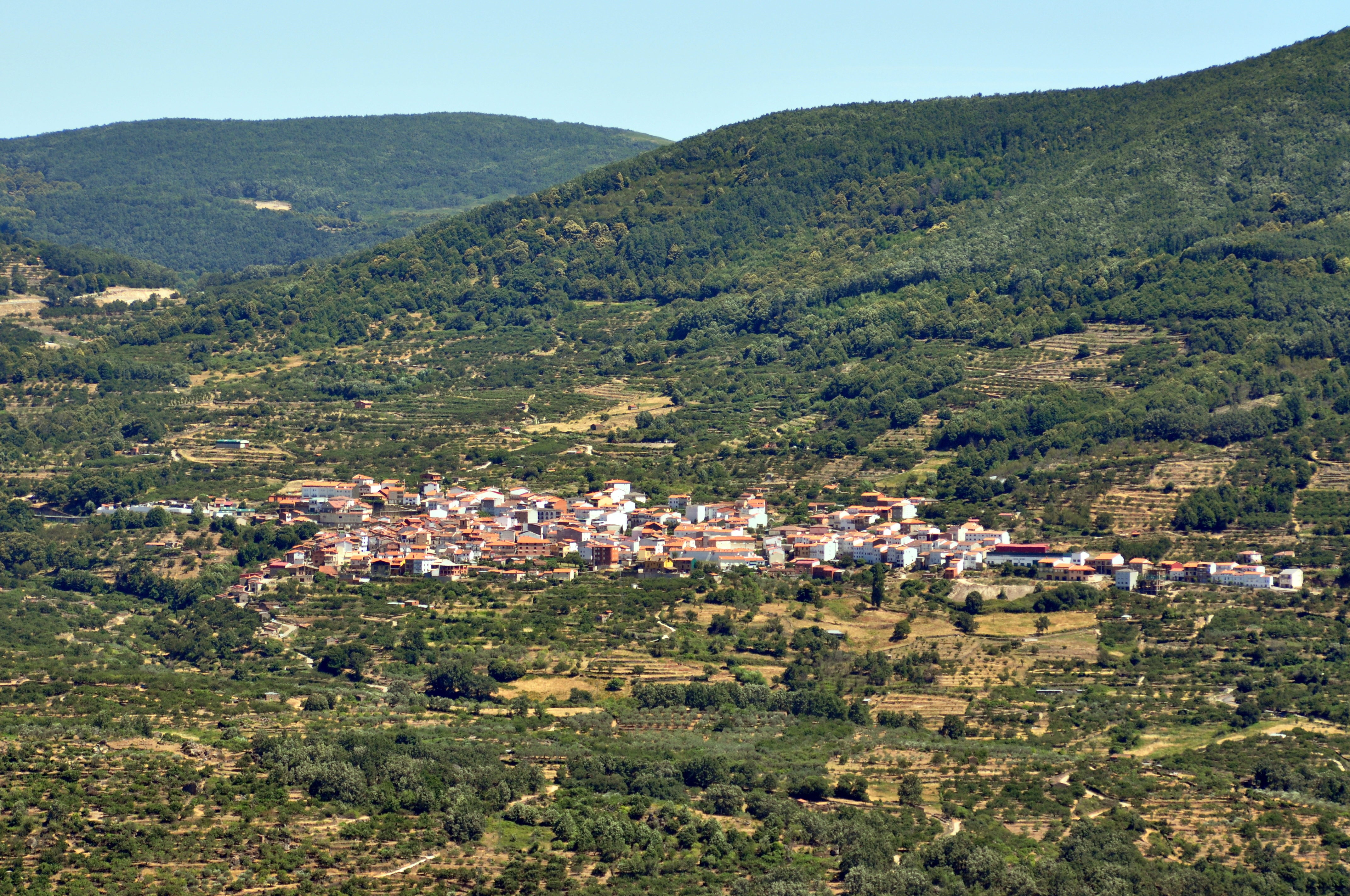 Vista de la población de Casas del Castañar, en el Valle del Jerte (provincia de Cáceres, España), desde la población vecina de El Torno.